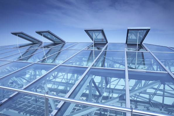 LAMILUX Tageslichtelemente